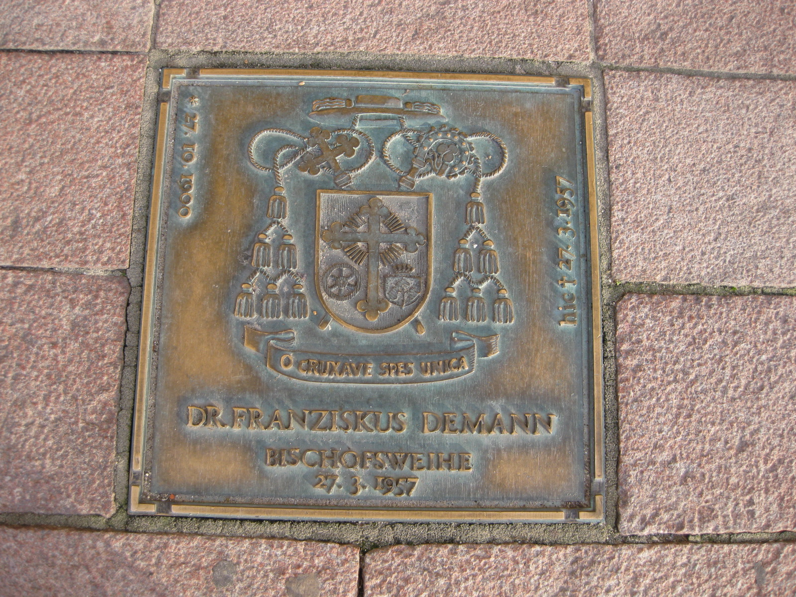 Plakette zur Erinnerung an die Bischofsweihe des Osnabrücker Bischofs Franziskus Demann vor dem Eingang des Osnabrücker Doms St. Peter. Demann starb unmittelbar nach seiner Weihe an dieser Stelle, als er die Menschen vor dem Dom segnen wollte.